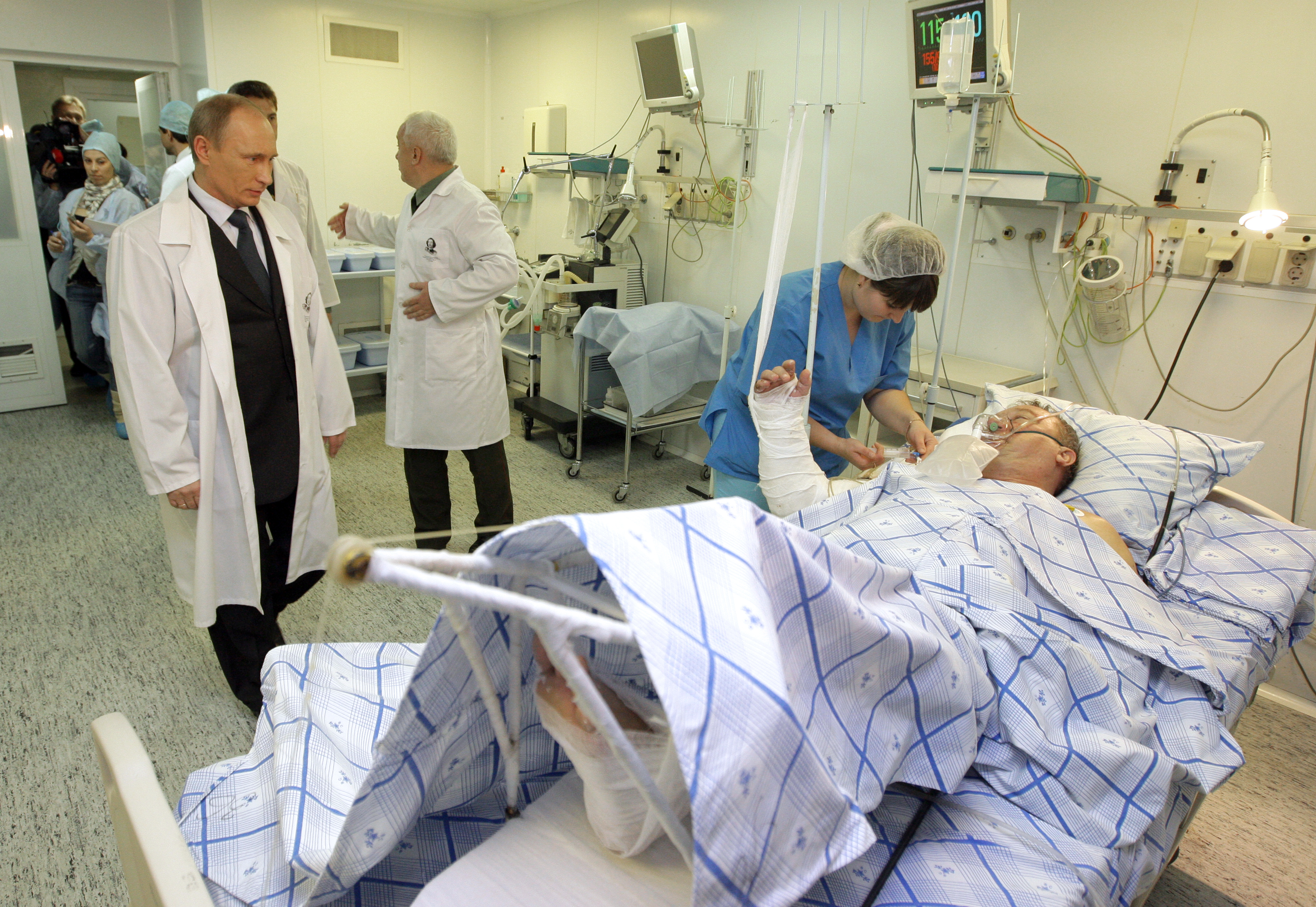 Председатель Правительства Российской Федерации В. В. Путин посетил госпиталь им. Бурденко, в который был доставлен пострадавший в ДТП командующий Воздушно-десантными войсками России генерал-лейтенант В. А. Шаманов